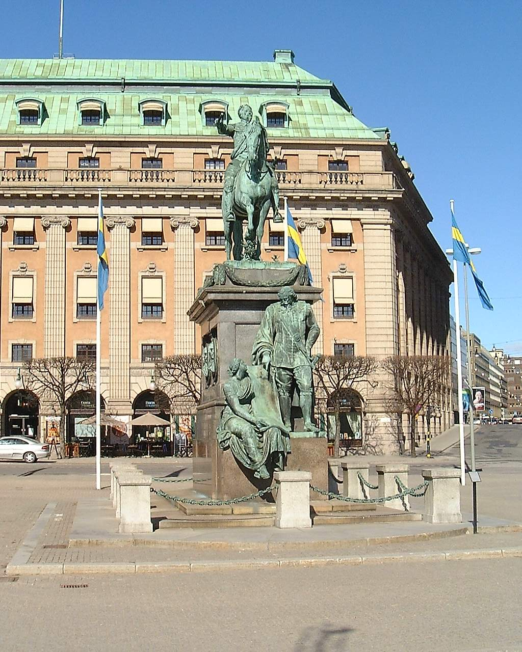 Equestrian statue of Gustavus Adolphus at Gustav Adolfs torg, Stockholm.